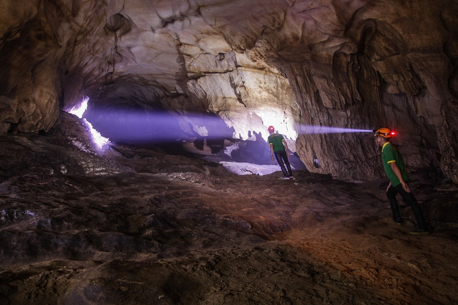 Hua ma cave